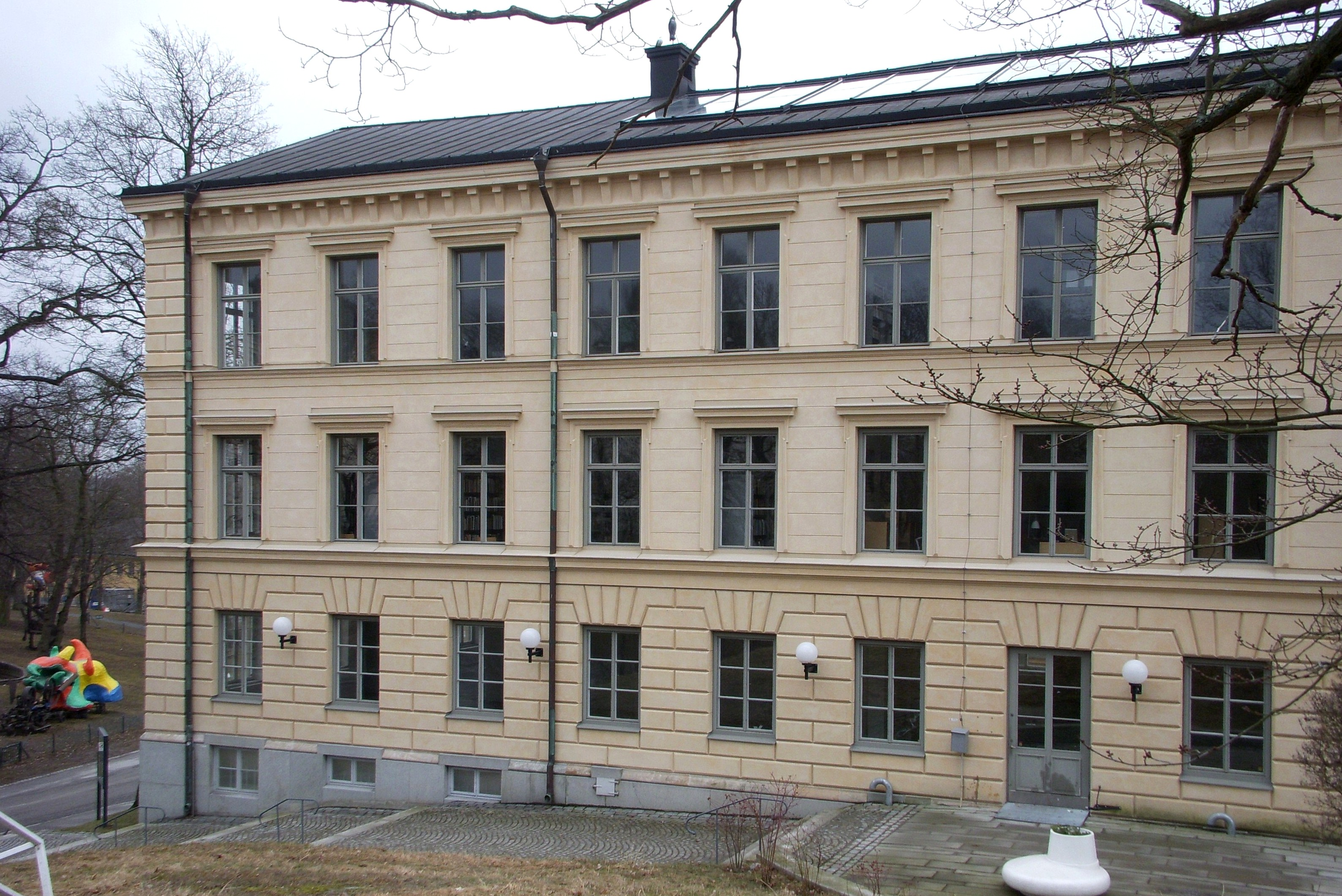 Sjökarteverket på Skeppsholmen i Stockholm, arkitekt Victor Ringheim, byggmästare Emil Hawerman